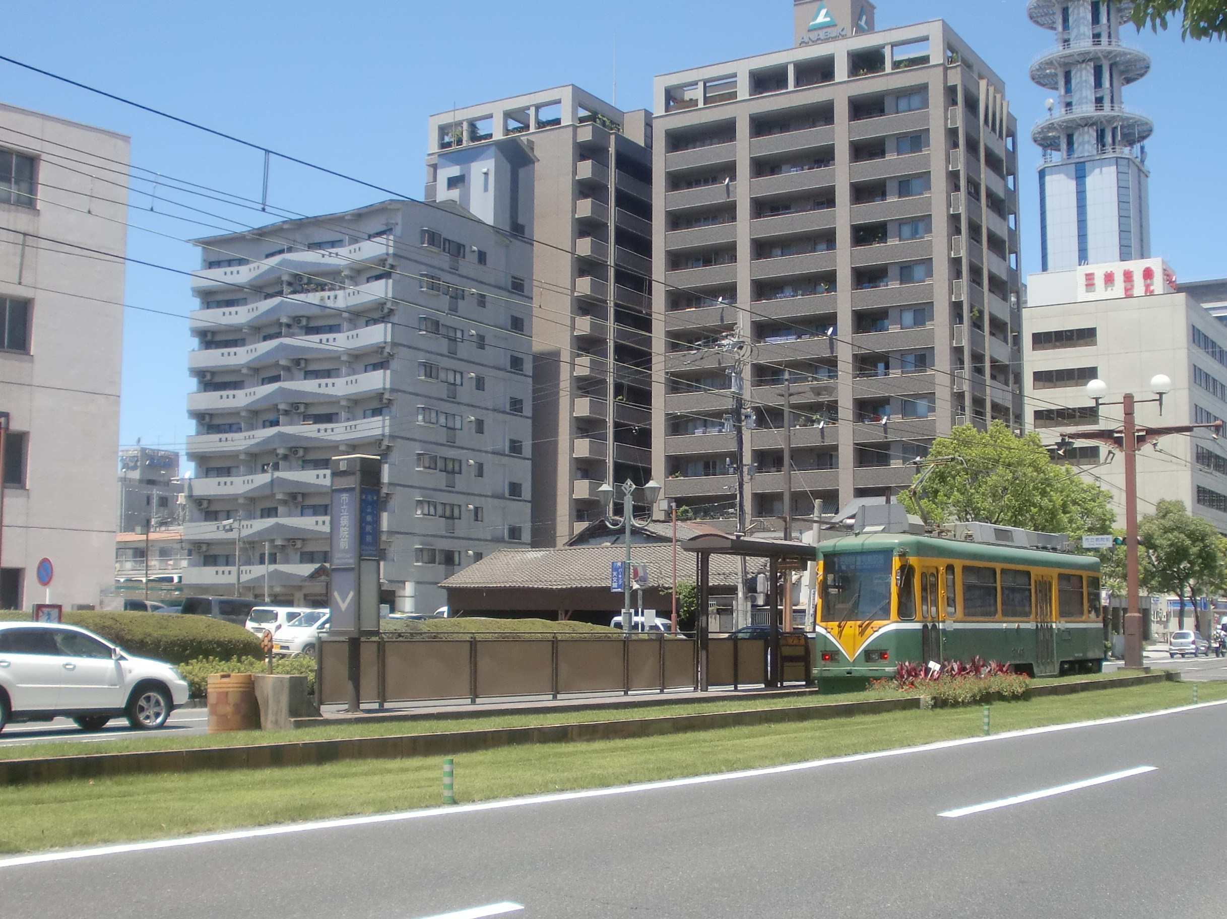 市立病院前駅_(鹿児島県)の外観。